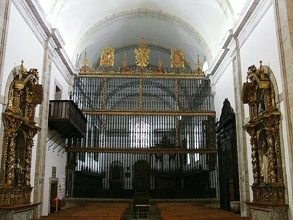 Reja del coro del Monasterio de MM Cistercienses de San Miguel de las Dueñas, provincia de León, España